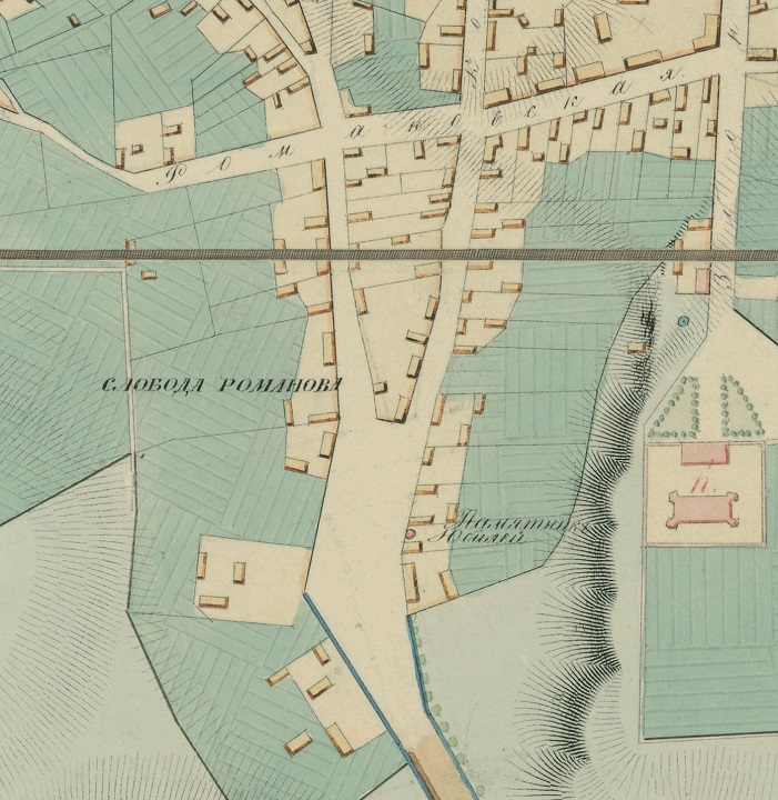 Беларуская (тарашкевіца): Менск (Miensk), Раманаўская Слабада (Ramanaŭskaja Słabada). Плян